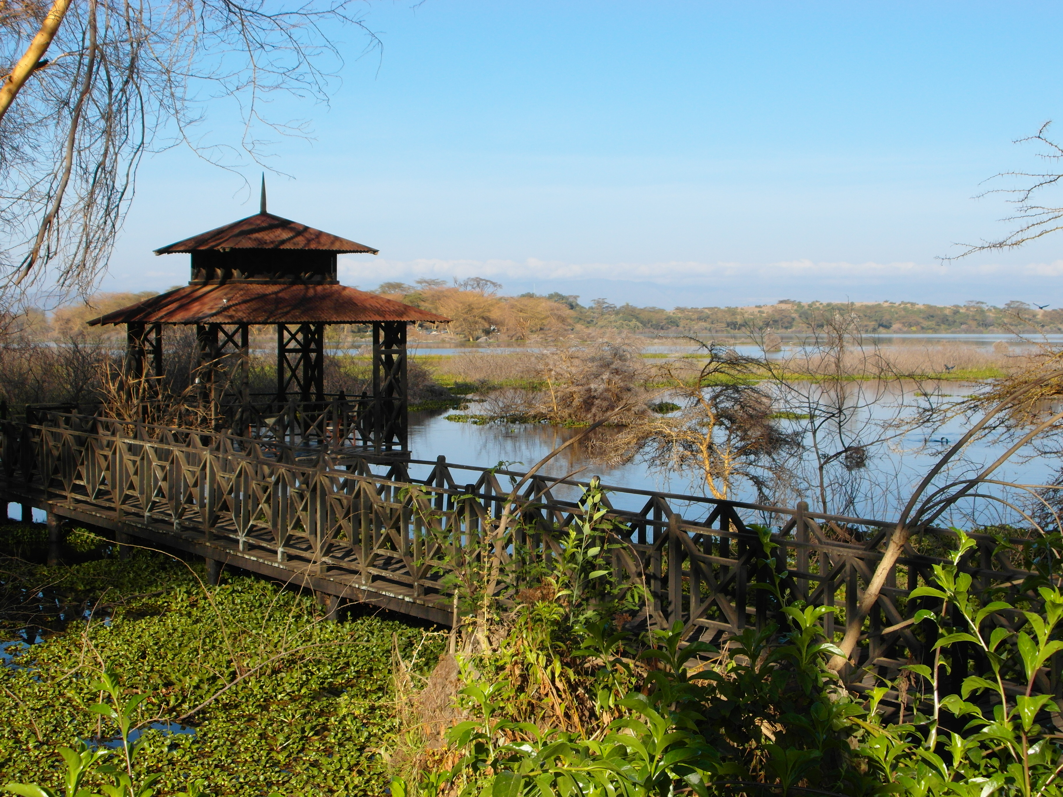 Kenya 2013. At the Lake Naivasha.